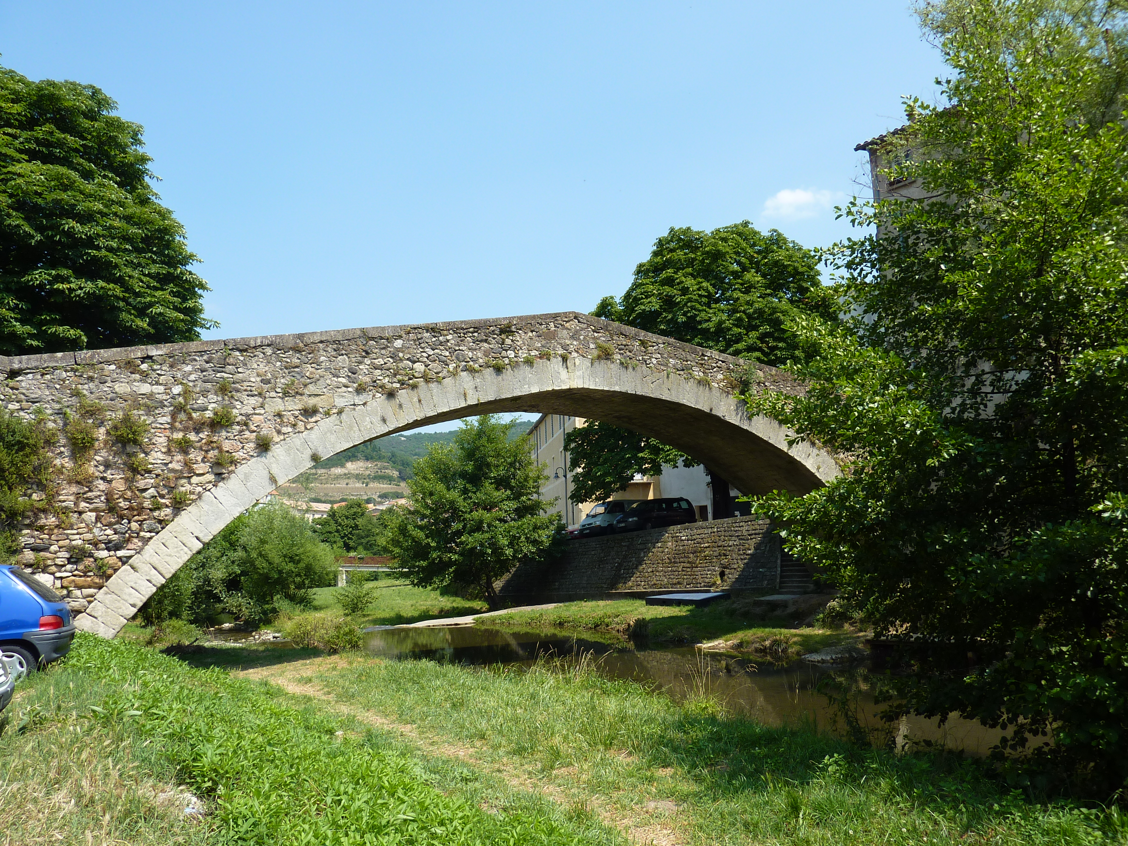 Pont de Montifort (Lodeva, Erau, Llenguadoc-Rosselló)